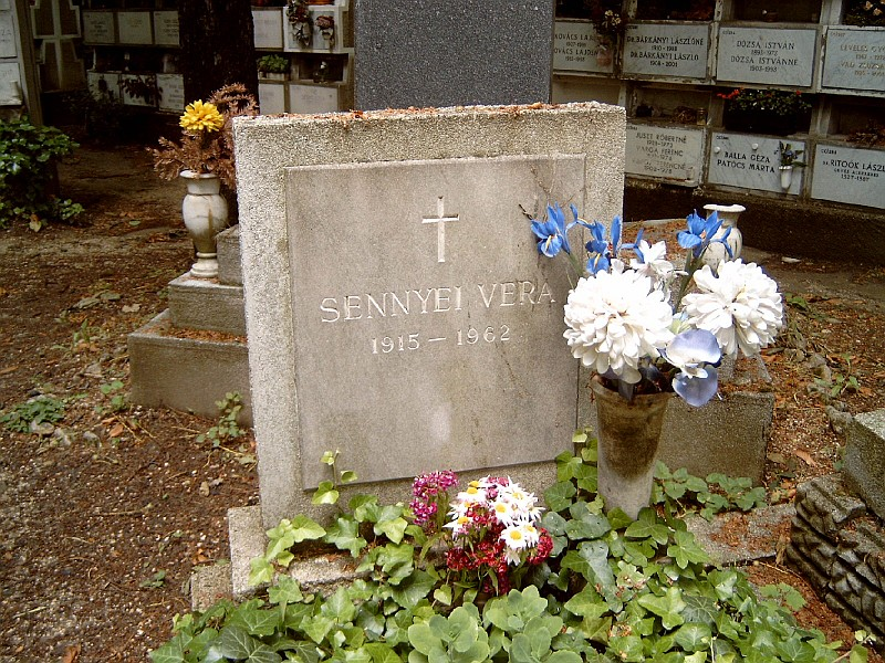 Sennyei Vera (Budapest, 1915. január 3. – Budapest, 1962. május 28.) színésznő, érdemes művész (1961) sírja Budapesten. Farkasréti temető: 41-1-39